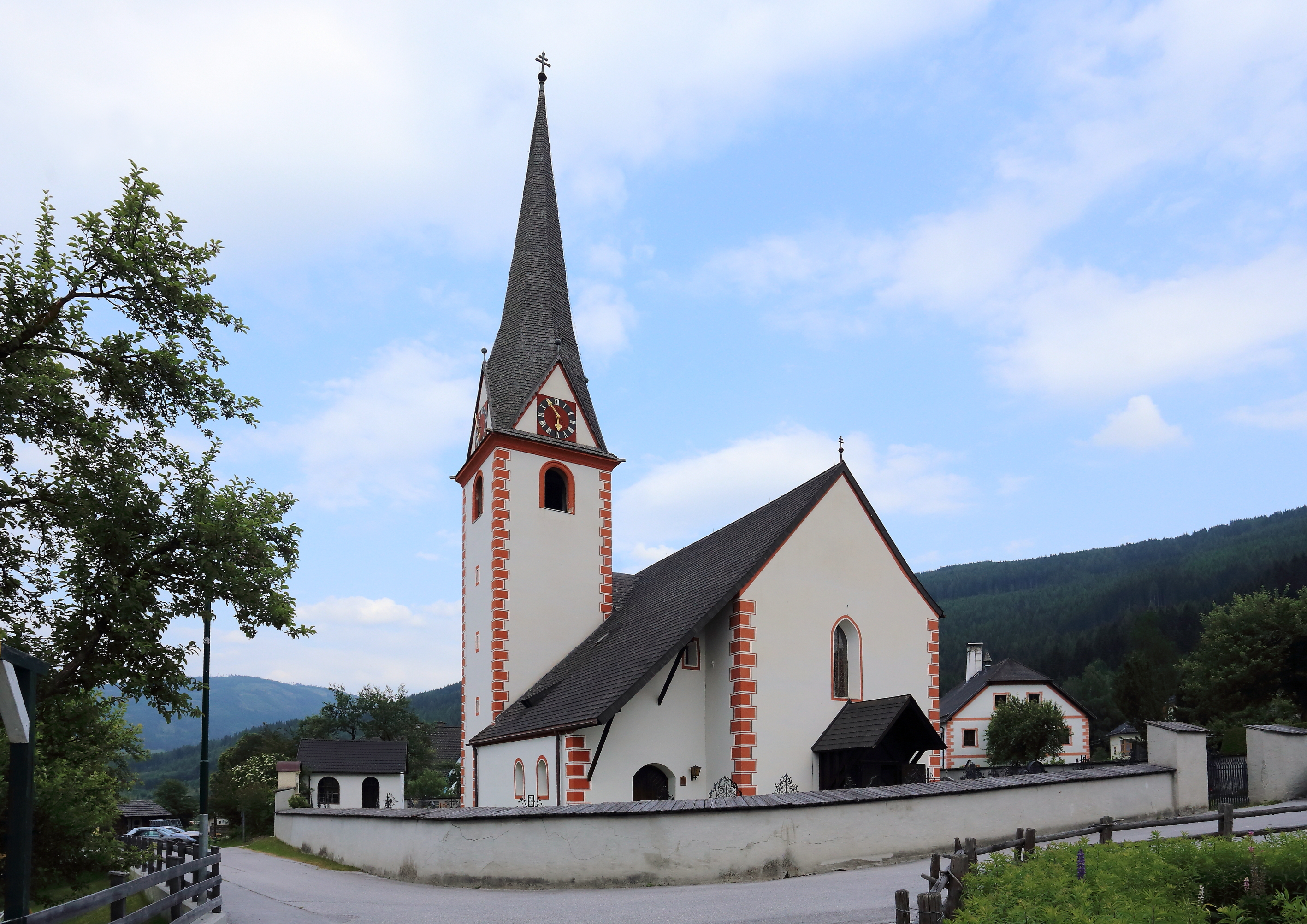 Katholische Pfarrkirche hl. Margaretha in der Salzburger Gemeinde Sankt Margarethen im Lungau.